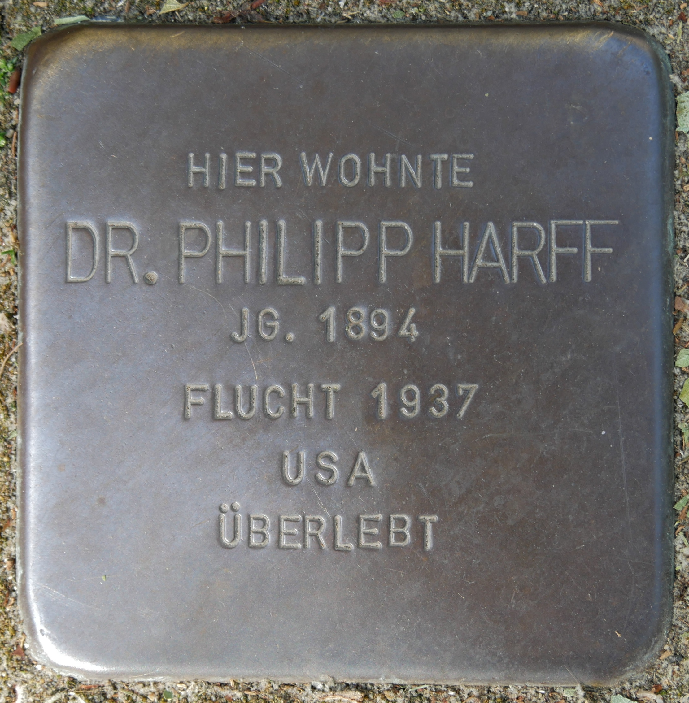 Stolpersteine Wesel: Harff, Philipp